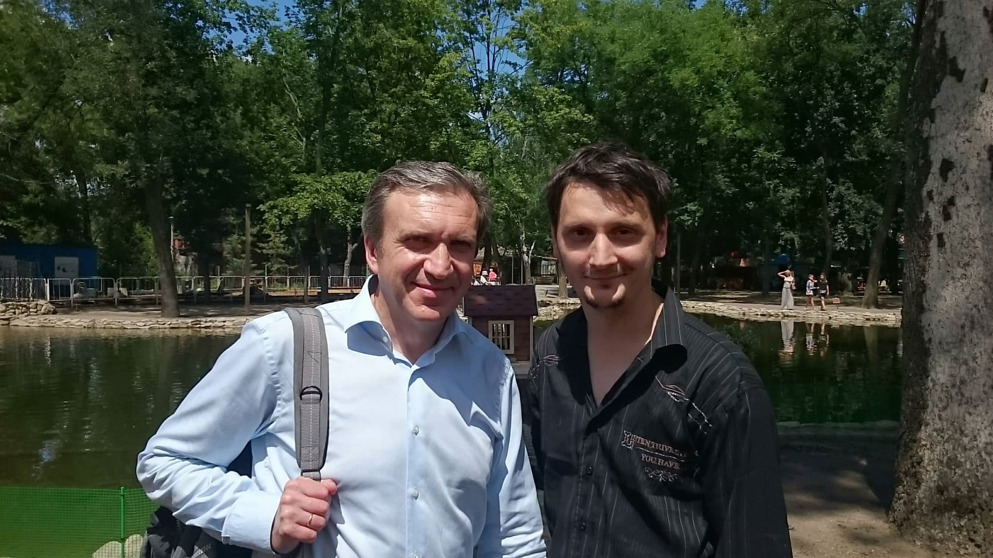 В Мелитополе, на встречи с молодежью города